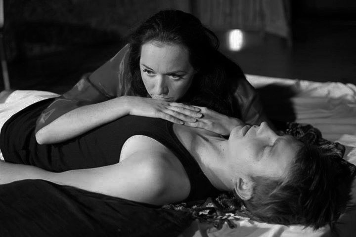 Teater Karakteri lavastus "Kokaiin"